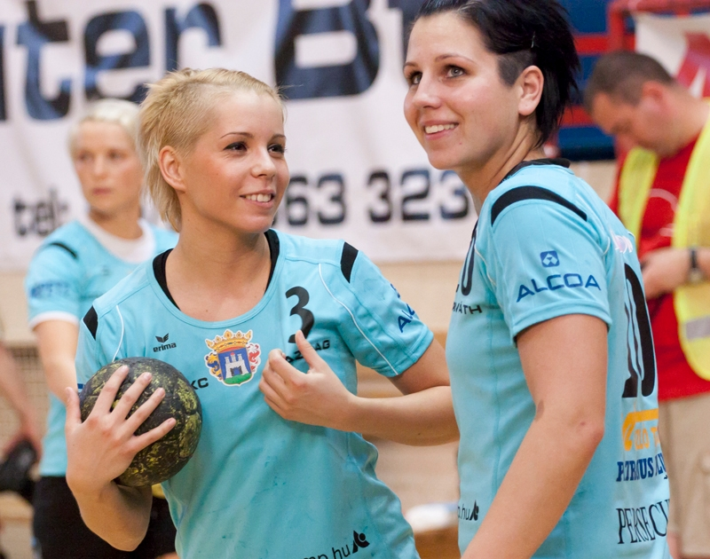 Gazdag Kitti (balra) és Horváth Bernadett (jobbra) kézilabdázók.